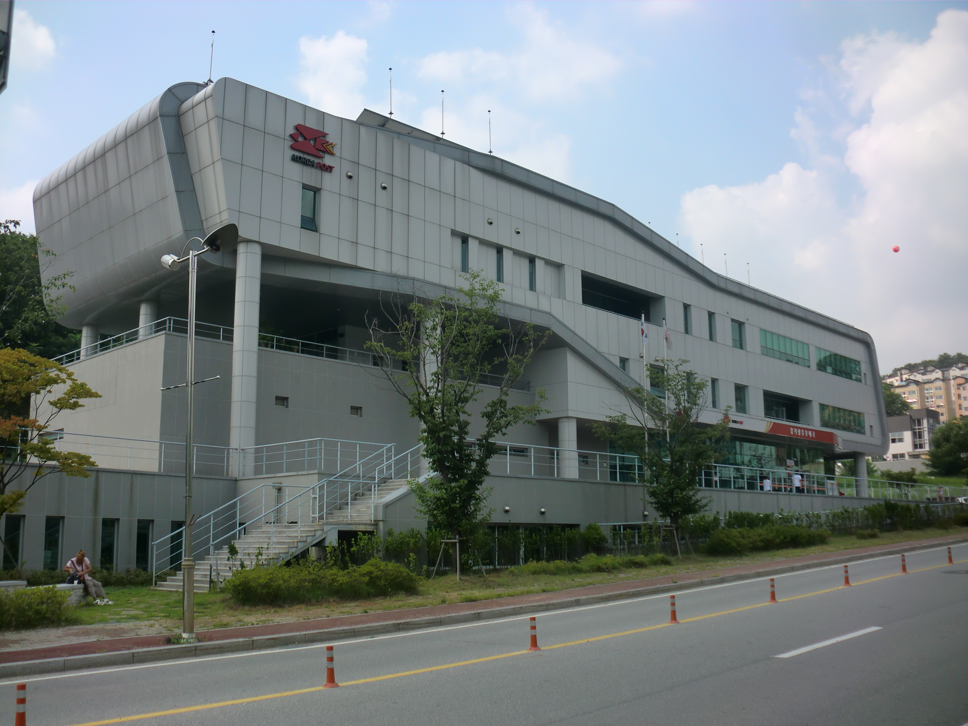 경기도 광주시에 있는 경기광주우체국